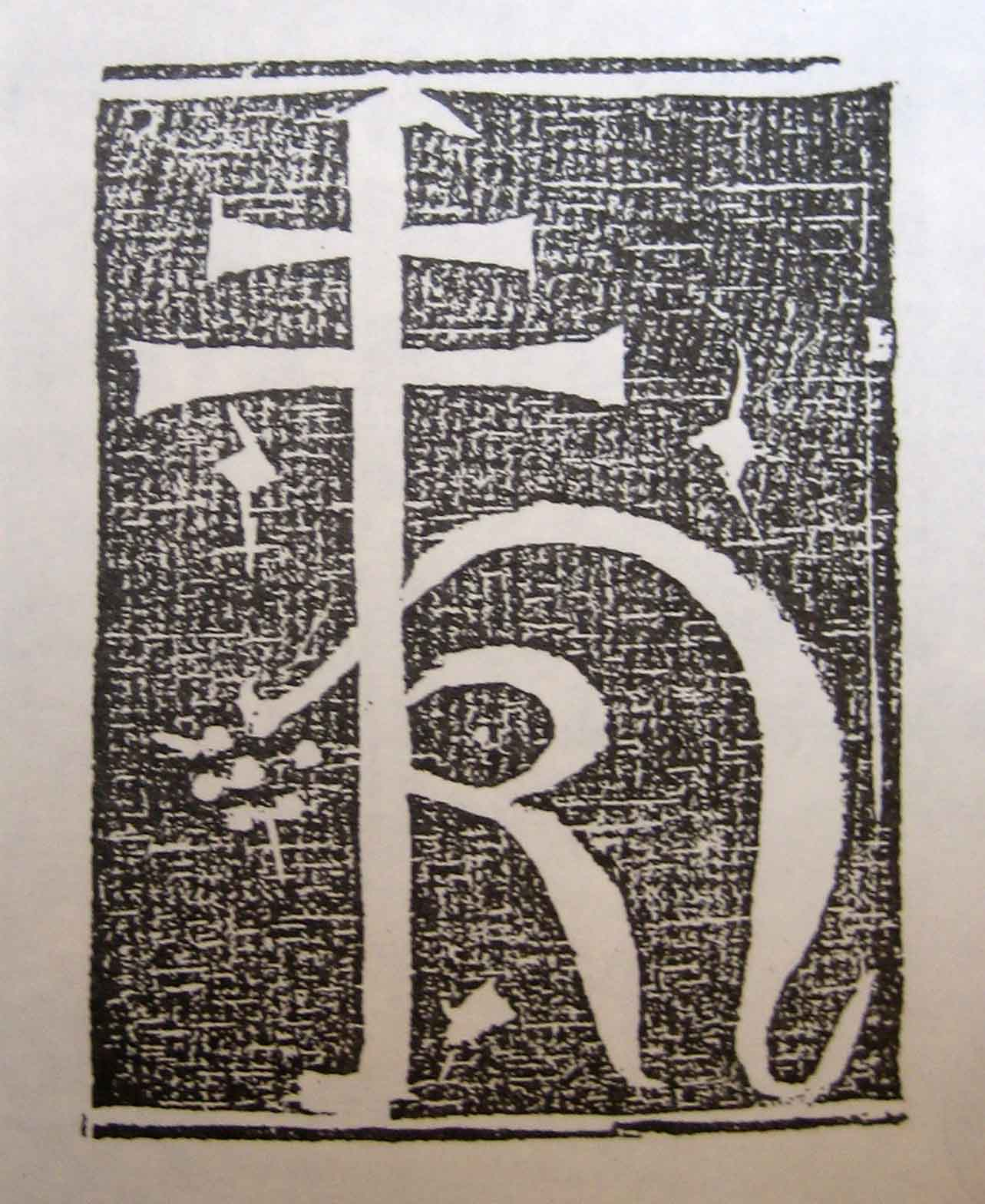 Reproducció de la marca d'impressor del llibre "Vocabulari molt profitos per apendre Lo Catalan Alamany y Lo Alamany Catalan" de Joan Rosembach (any 1502)